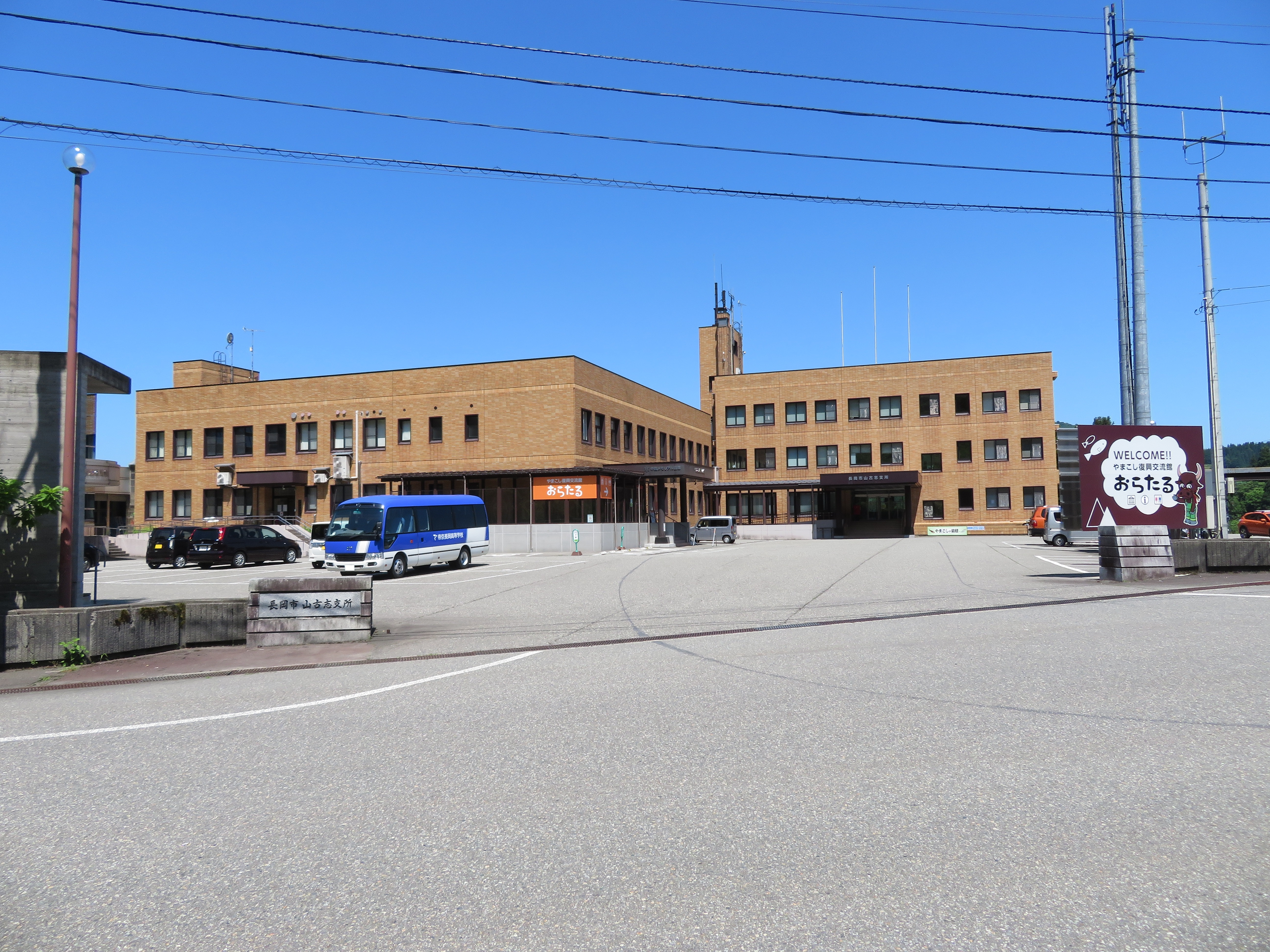 新潟県長岡市に所在する長岡市役所山古志支所（旧山古志村役場）庁舎 Canon PowerShot SX720 HS